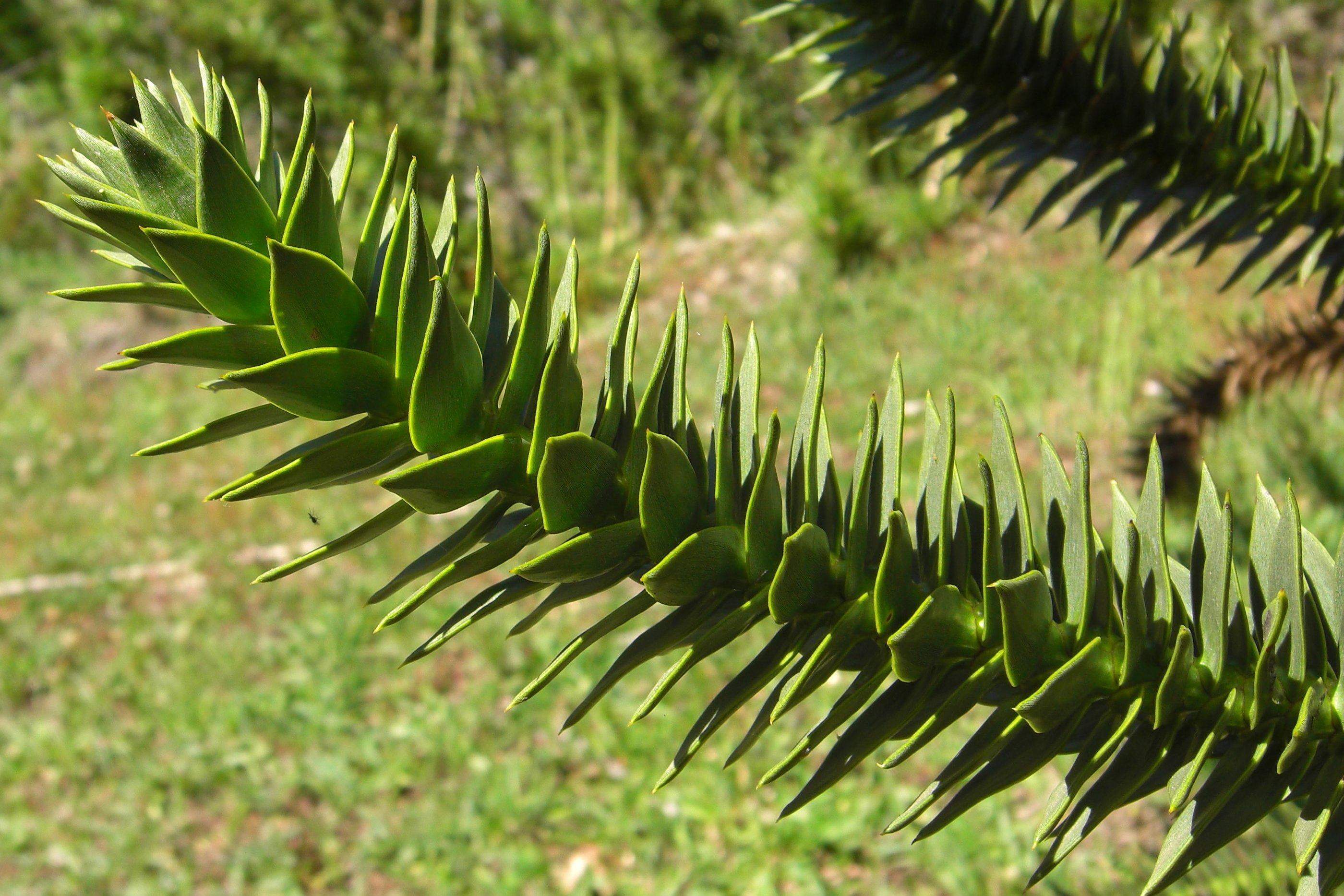 Araucaria araucana (Molina) K. Koch 20081207 Parque Nacional Huerquehue, Chile